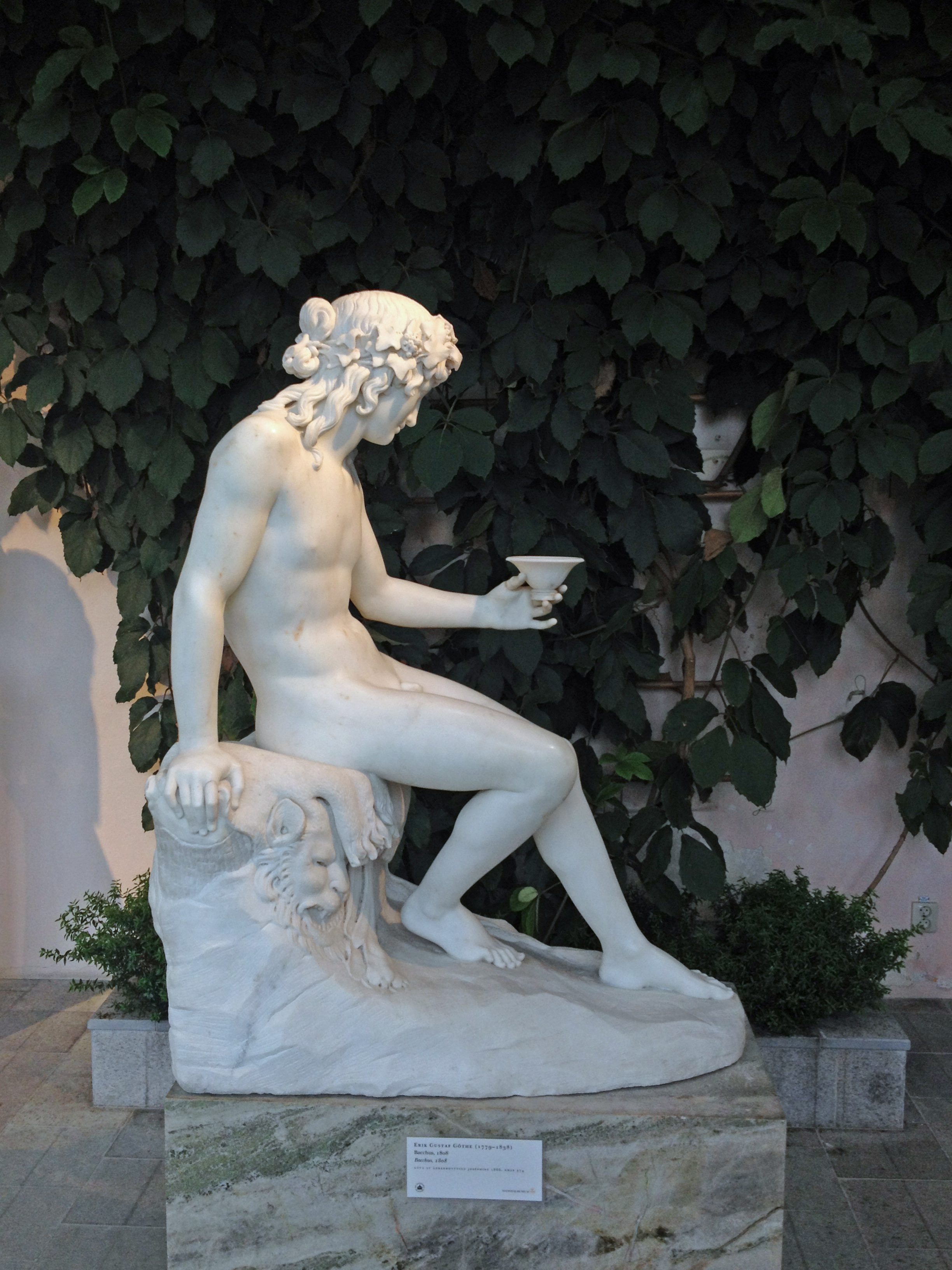 Bacchus av Erik Gustaf Göthe 1808 i Orangerimuseet